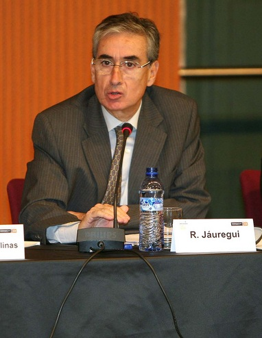 Ramón Jauregui (PSOE), durante su intervención